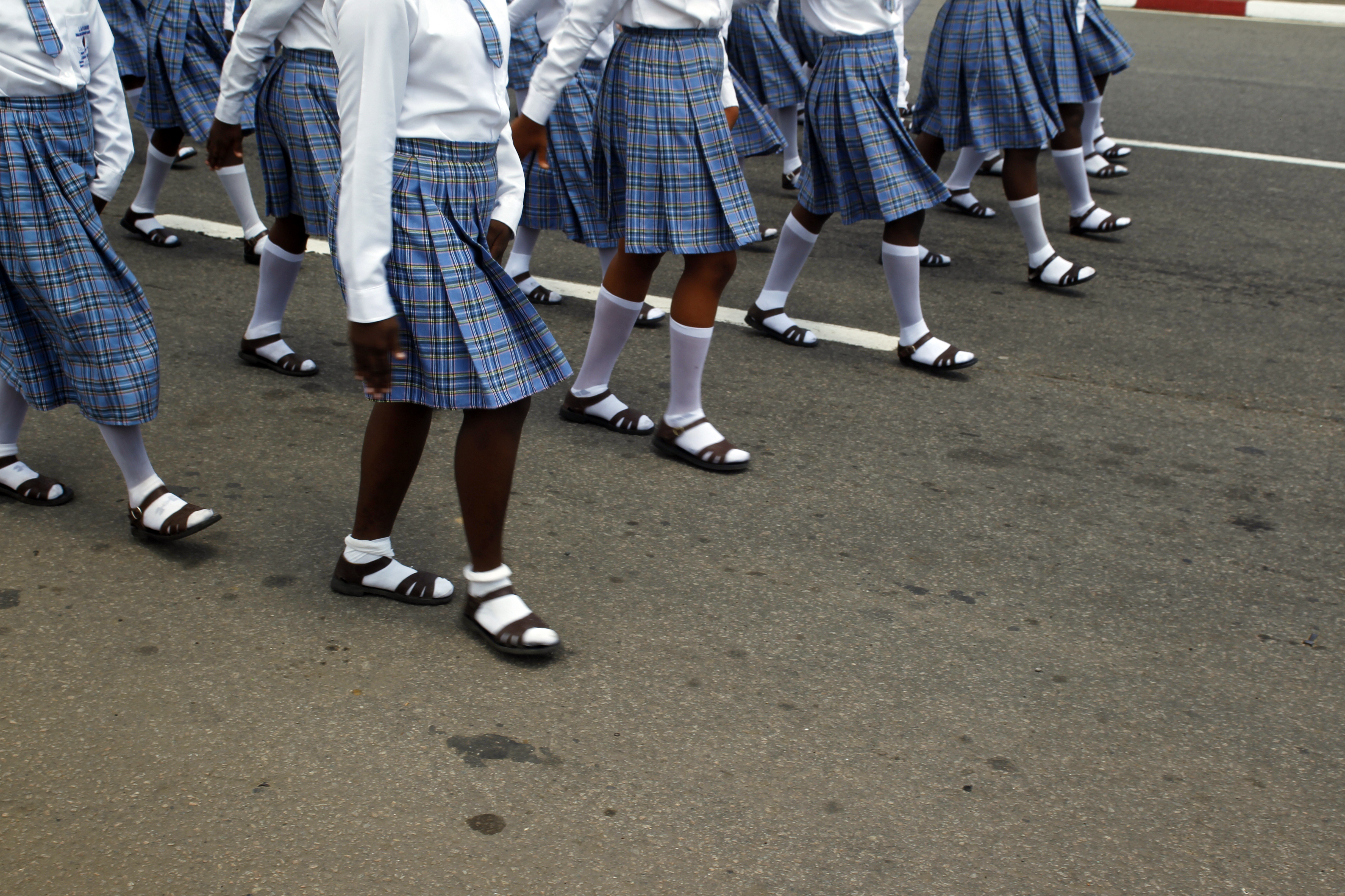 Les élèves et étudiants camerounais lors du défilé de la fête nationale du Cameroun le 20 mai 2019 à Douala This is an image with the theme "Africa on the Move or Transport" from: Cameroon